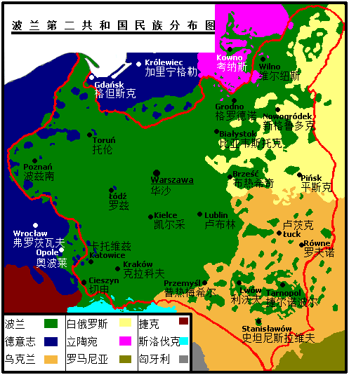 Narody w II Rzeczypospolitej